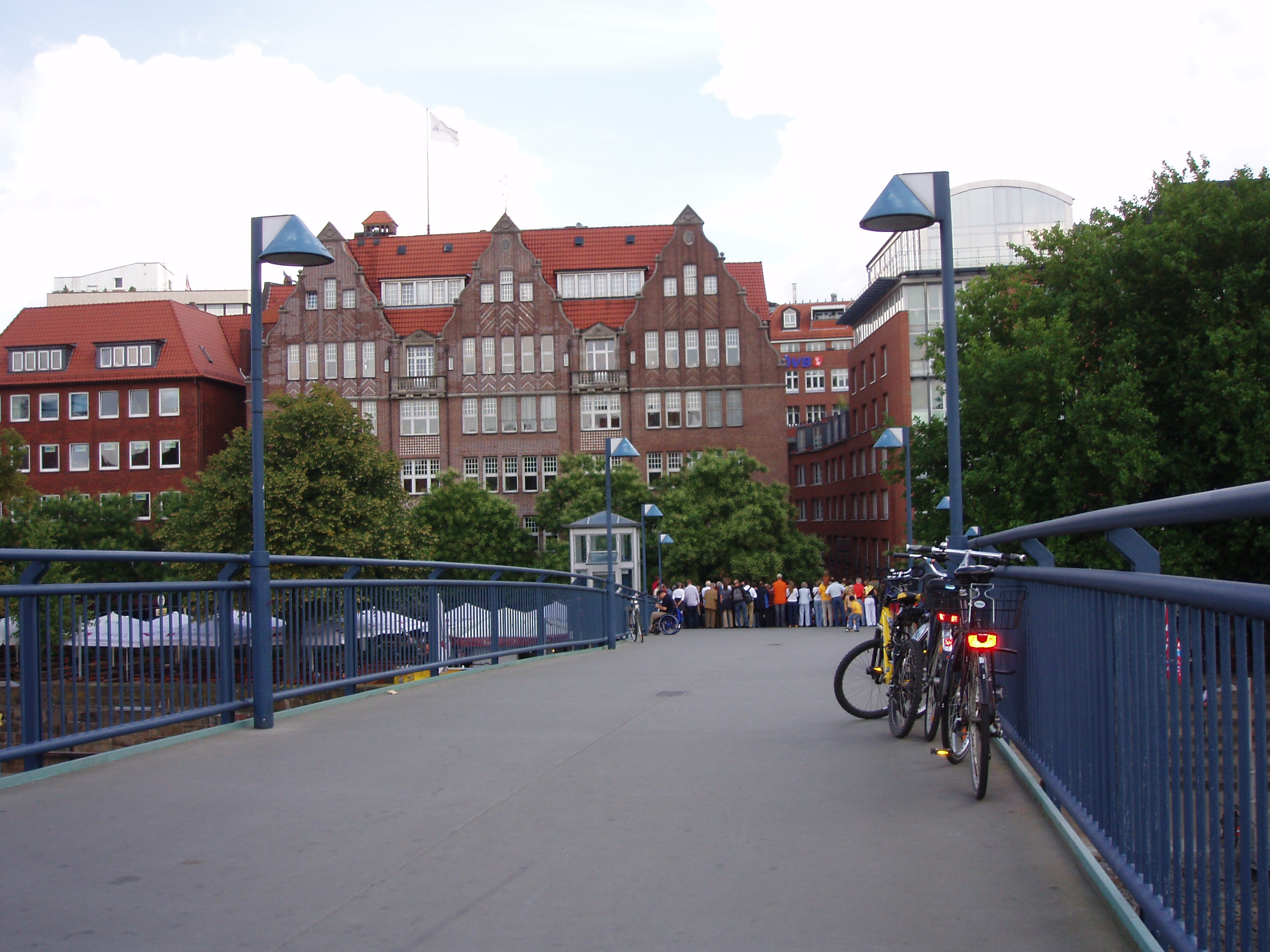 Fußgängerbrücke (Teerhofbrücke) mit Blick auf die Bebauung an der Schlachte in Bremen. Das dreigiebelige Kontorhaus rechts wurde 1913 von der ehemaligen Bremer Handelsspedition J.H. Bachmann als Firmensitz erstellt und nach Kriegszerstörungen 1948 in der alten Form wiederaufgebaut. Seit 2006/07 befindet sich darin u. a. der Deutschlandsitz des Nachfolgeunternehmens DVS Sea & Air GmbH, die zum dänischen Logistikkonzern DSV A/S gehört.